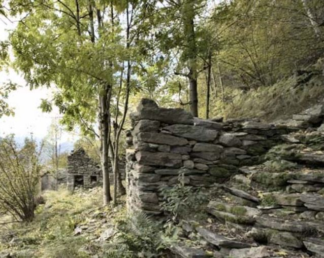 Alpe Fej